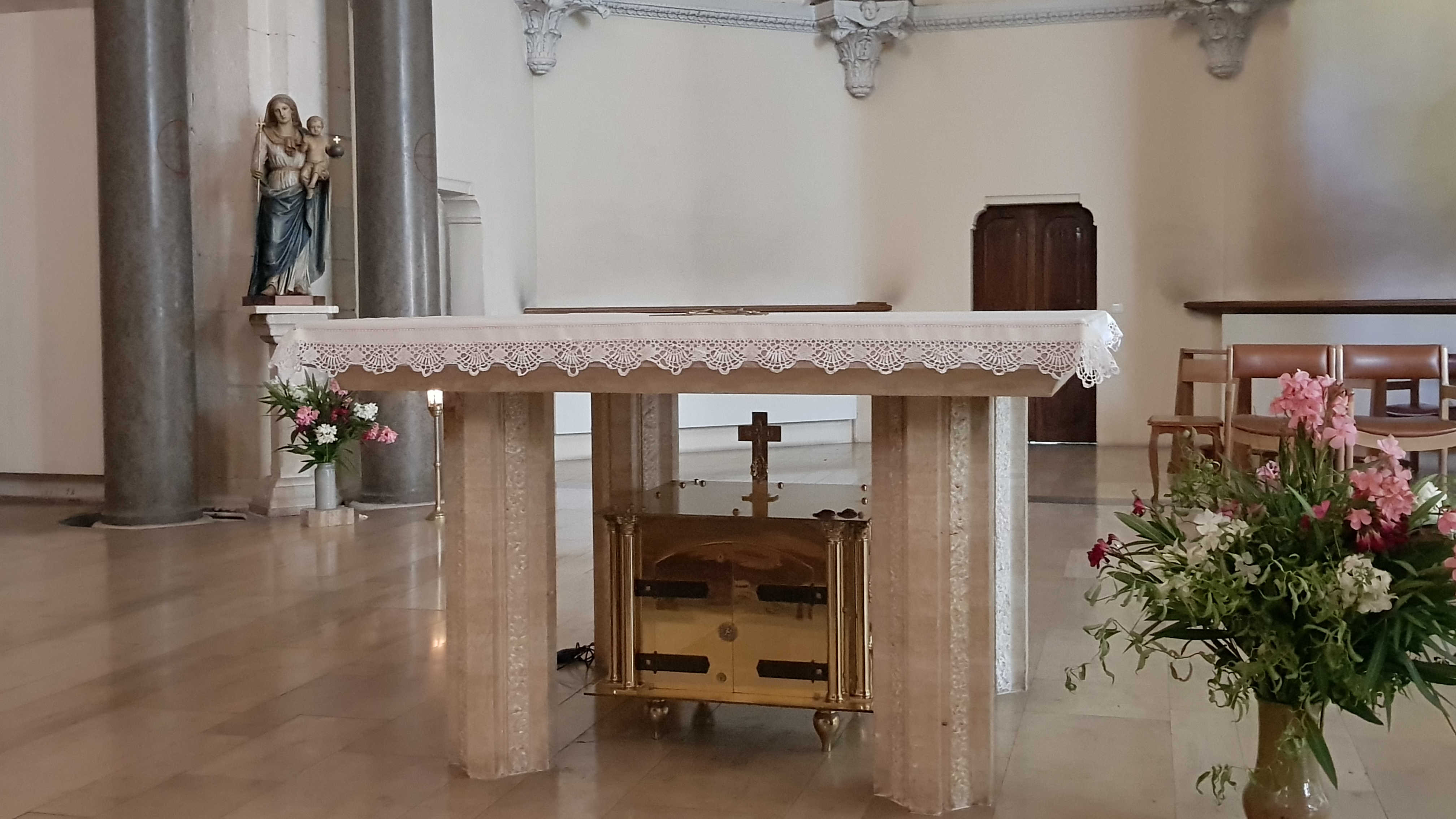 Reliquienschrein der seligen Marie Rivier